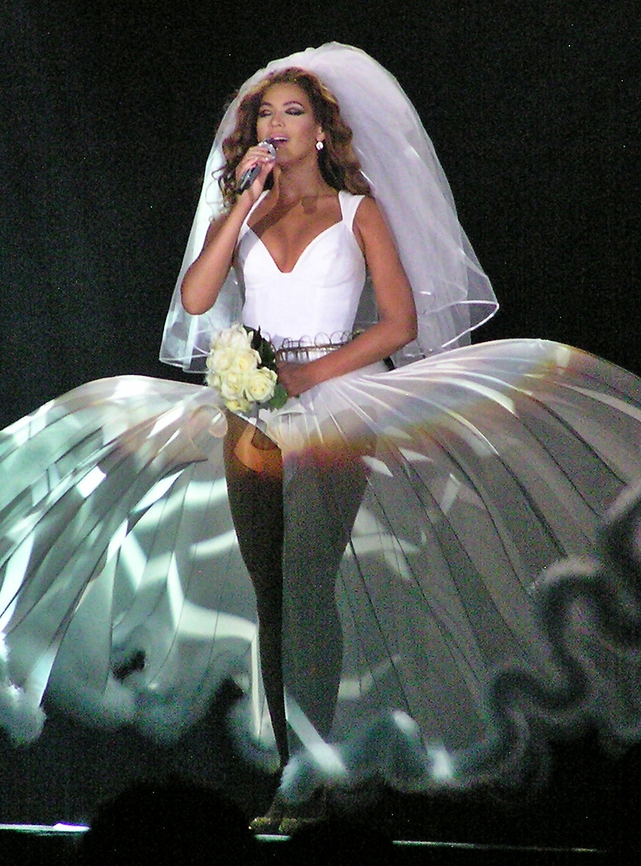 Beyoncé cantando "Ave Maria" na "I Am... Tour" em Newcastle, Inglaterra, em 2009.